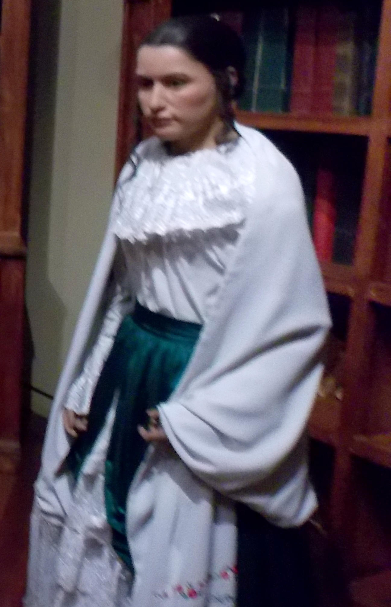 Figuras en cera de los próceres quiteños Eugenio y Manuela Espejo, parte de la colección del Museo Alberto Mena Caamaño, en el centro histórico de la ciudad de Quito (Ecuador).